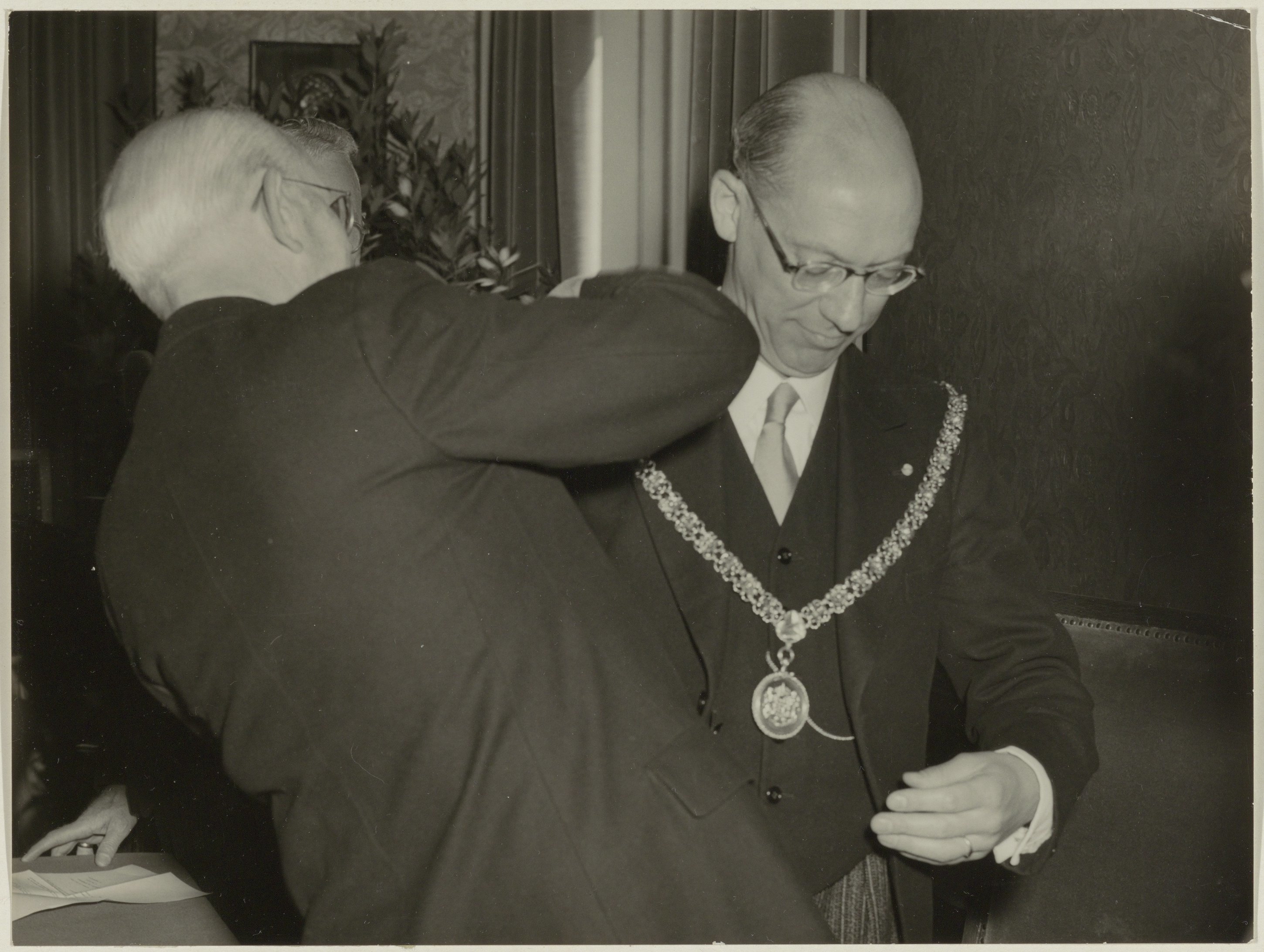 CollectieCollectie Fotoburo de BoerInventarisnummerNL-HlmNHA_54004561BeschrijvingWethouder Van Geluk hangt de nieuwe burgemeester van Bloemendaal, D.H.Peereboom Voller, de ambtsketting om.FotonummerNL-HlmNHA_1478_0463DocumenttypeHistorieprenten, tekeningen en foto'sVervaardigerBoer, Cees de (1918-1985) Soort vervaardigerFotograaf AnnotatiesF4561PersonenGeluk, Van, wethouderPeereboom Voller, D.H. LandNederland ProvincieNoord-Holland GemeenteBloemendaal PlaatsBloemendaal Begindatum1954Einddatum1954TechniekFoto TrefwoordenGemeentebesturen